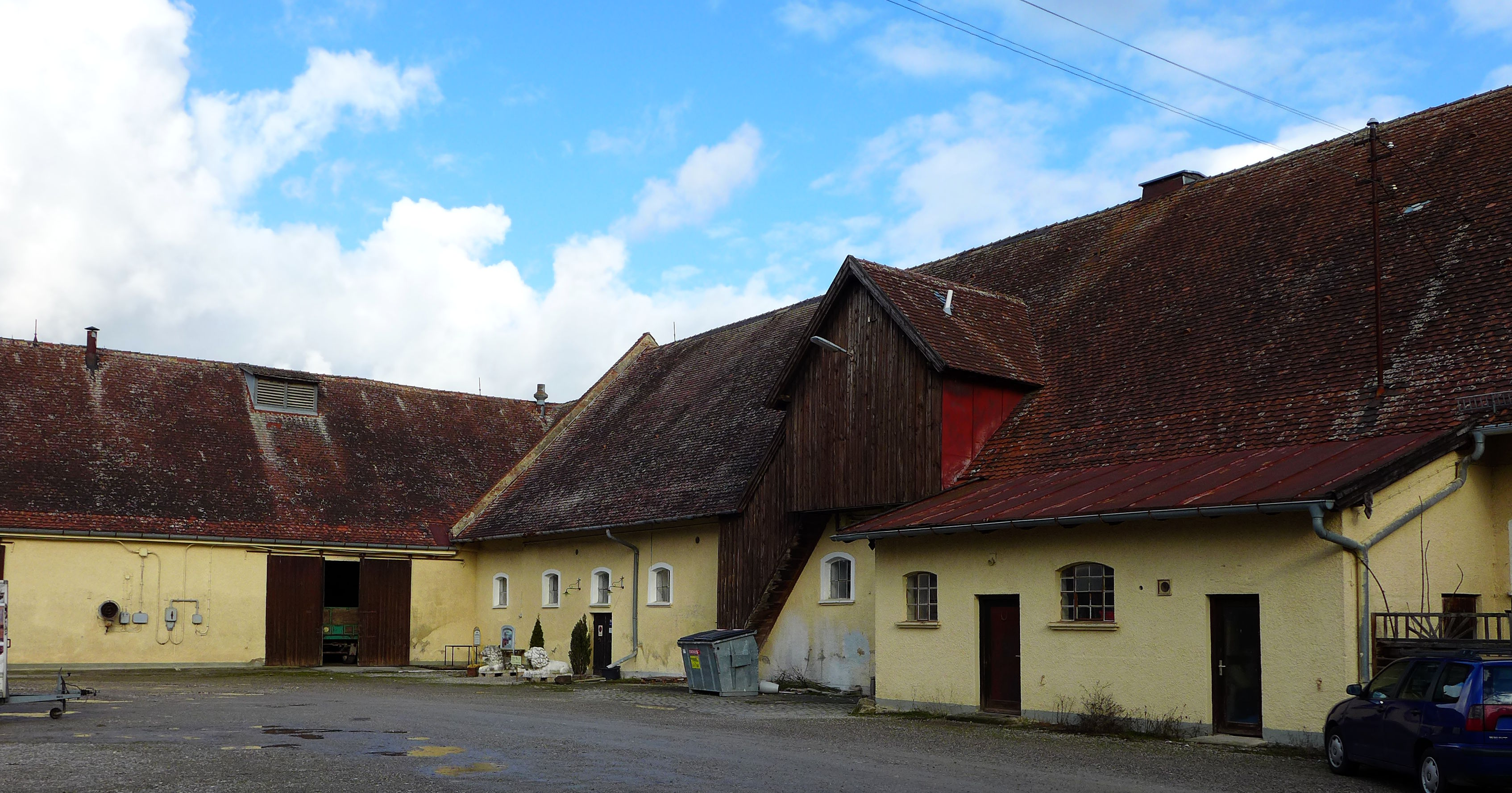 Freihamer Allee 21/23, München